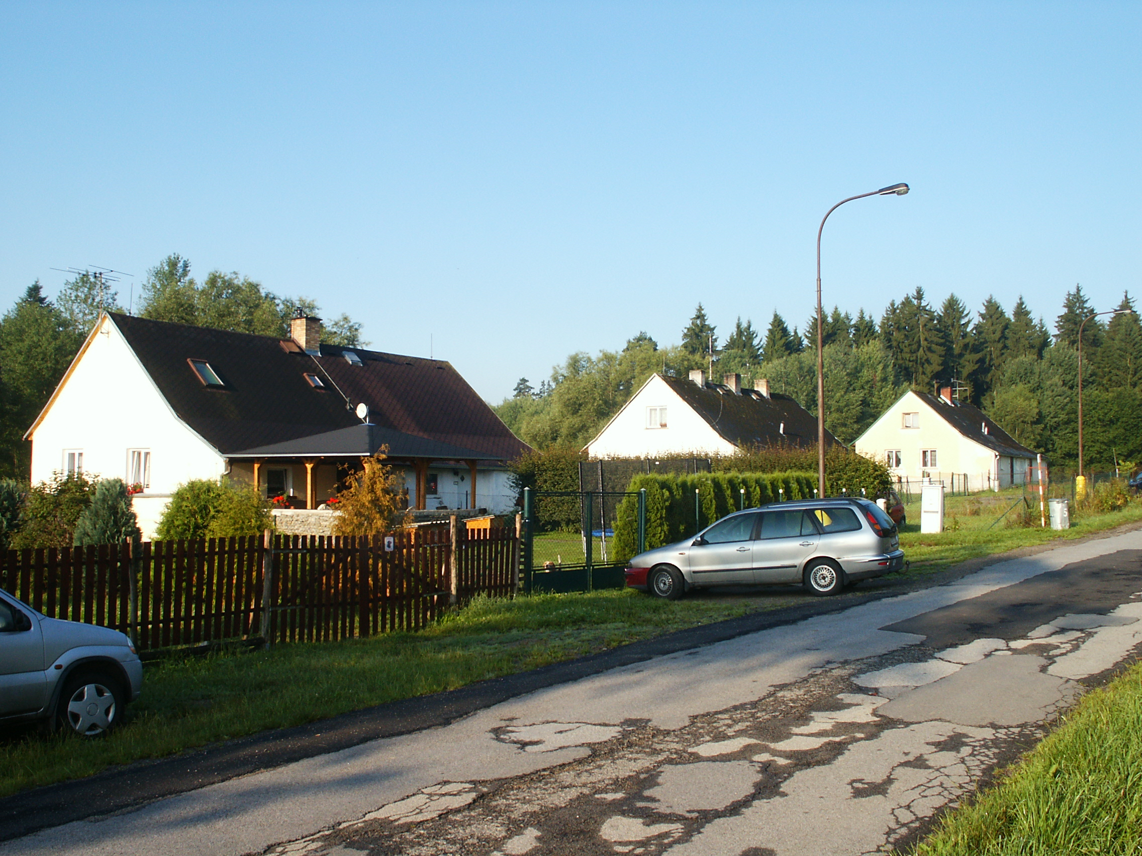 Dolní Drkolná - střed obce (č.p. 6-10)